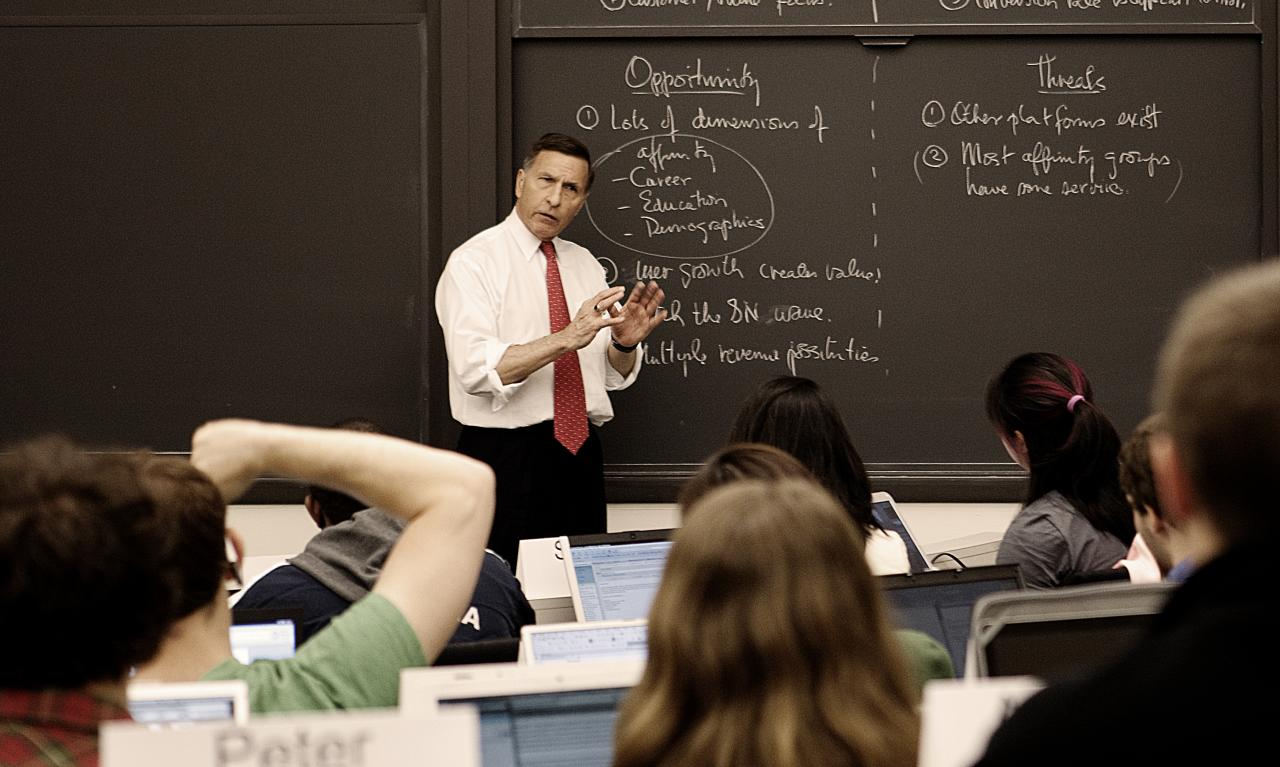 princeton